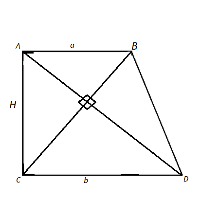 Düzbucaqlı trapesiya